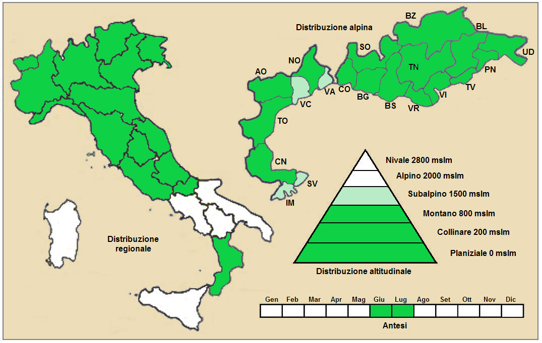 Forasacco spuntato (Bromus inermis) - Distribuzione in Italia